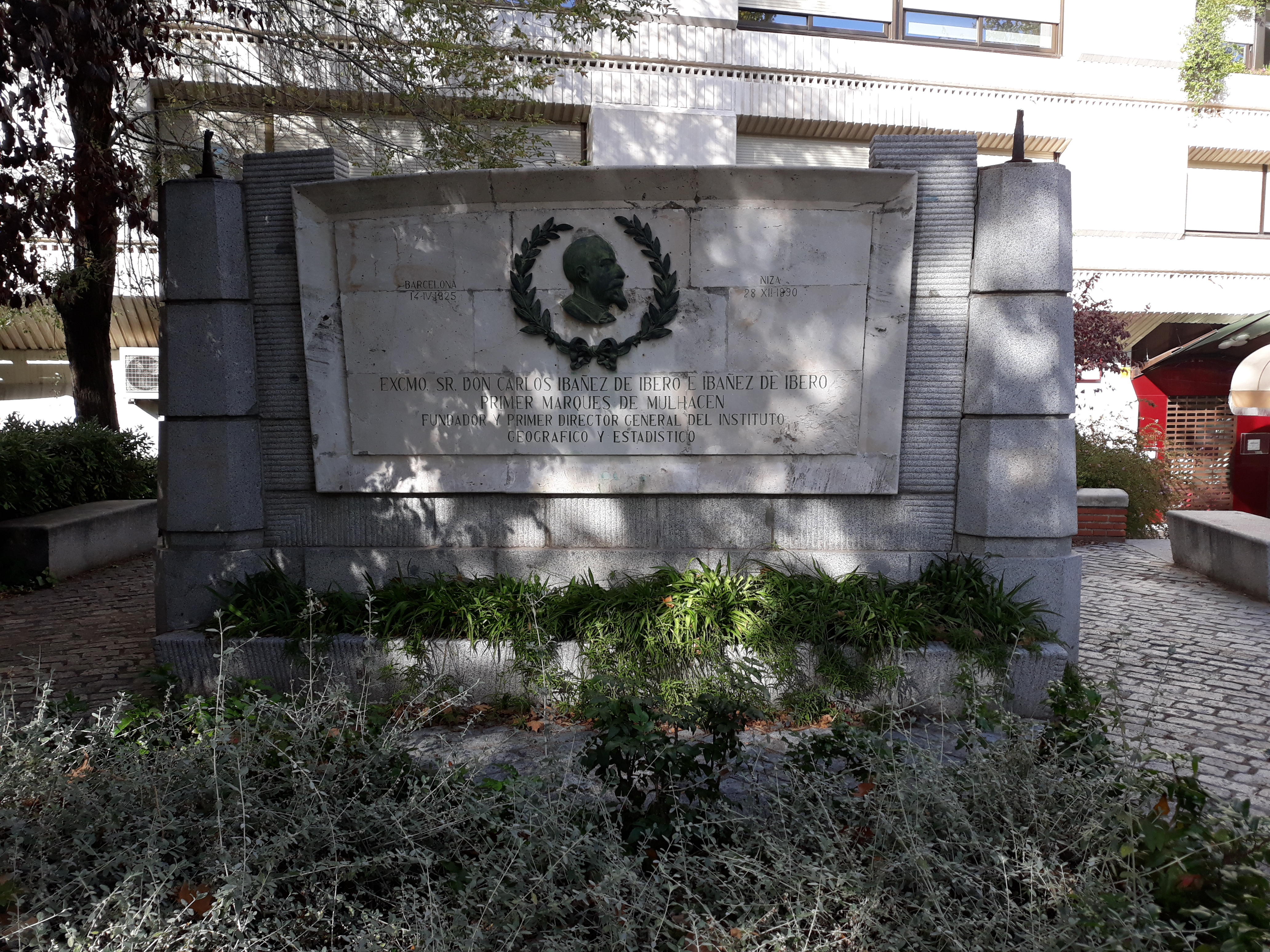 Das Denkmal für den spanischen Offizier und Vermessungsingenieur Carlos Ibanez e Ibanez de Ibero in Madrid.